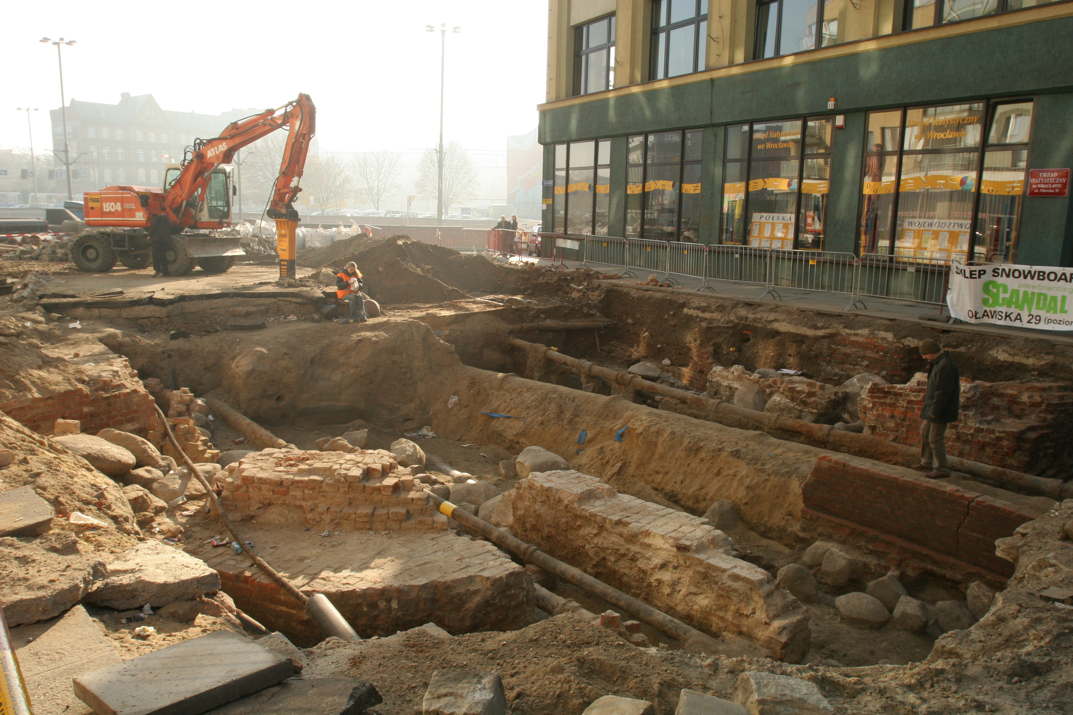 Fragmenty wewnętrznej Bramy Oławskiej we Wrocławiu odsłonięte podczas remontu ulicy Oławskiej. Po prawej widoczny gmach Urzędu Statystycznego (ul. Oławska nr 31)